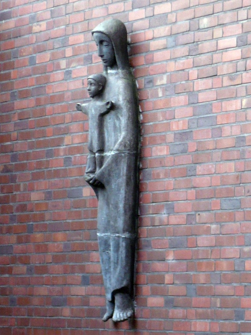 Madonnenstatue von Johann Fischedick in der St. Michael-Kirche im Essener Südostviertel